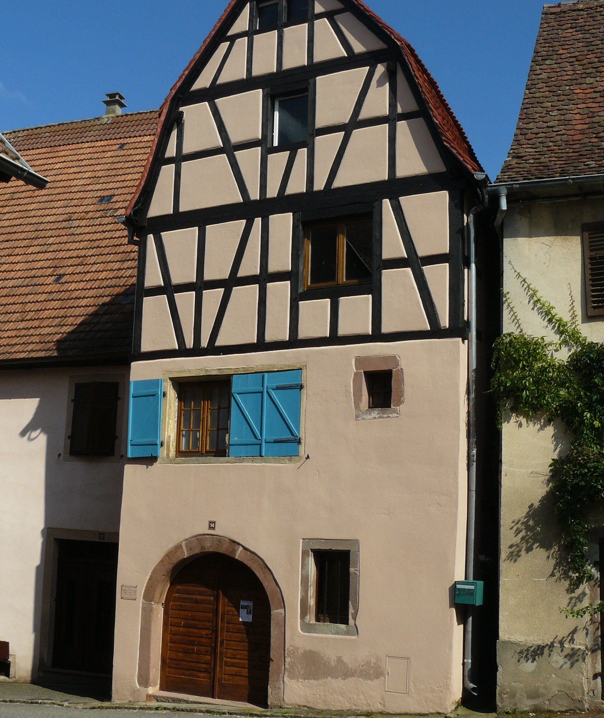 Ancien fournil communal (1490), 14 rue du Schlossberg